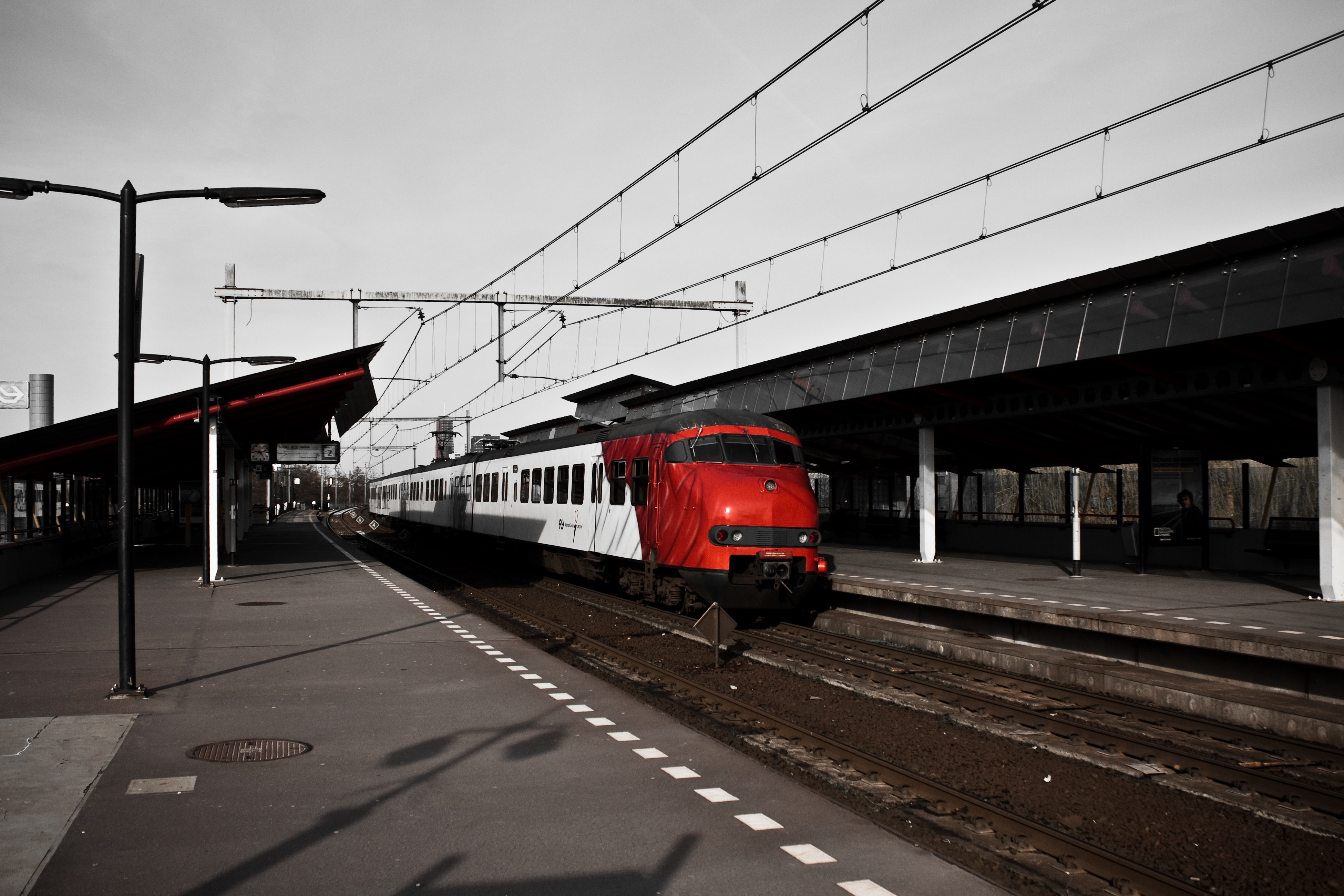 De vrijheidstrein passeert station Parkwijk op weg naar Almere Centrum